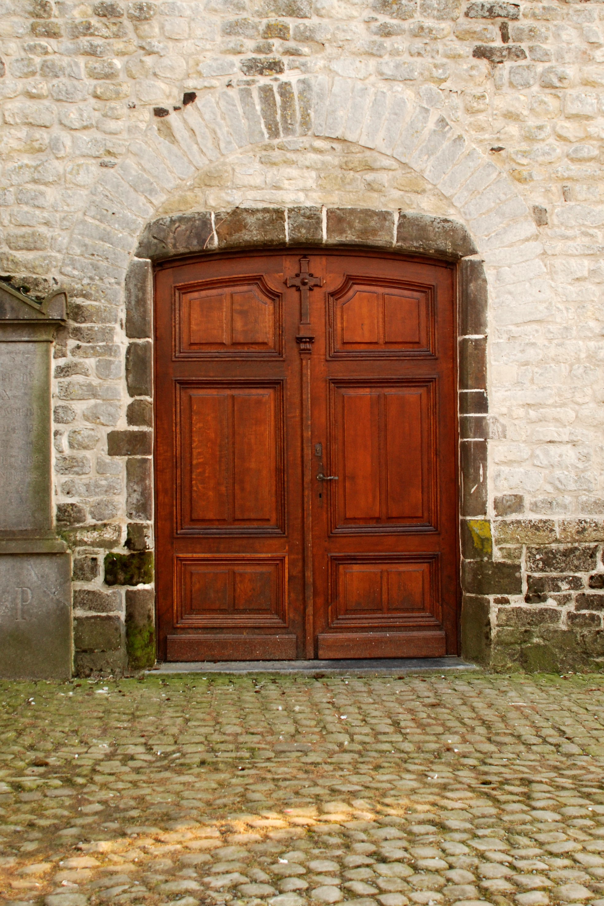 Belgique - Brabant Wallon - Lasne - Église Saint-Étienne d'Ohain